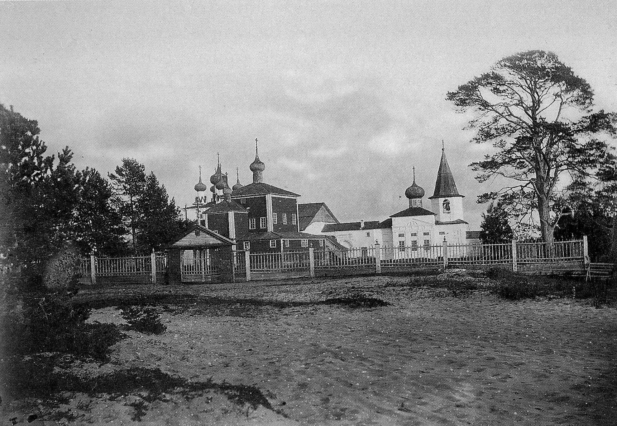 Архангельский уезд. Вид Пертоминского монастыря.